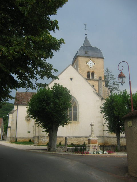 Eglise de Chambolle-Musigny, Bourgogne, France.